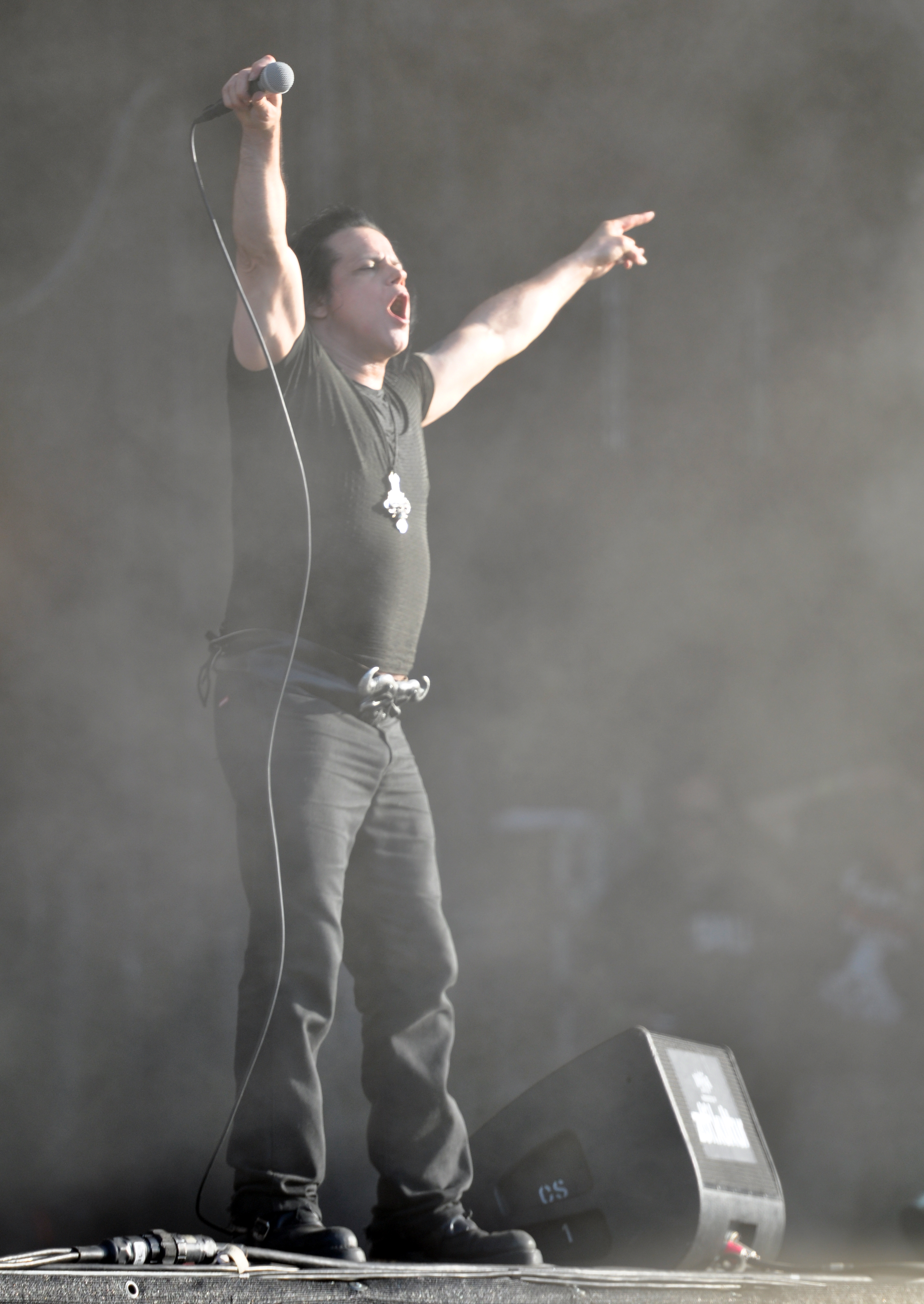 Danzig at Wacken Open Air 2013